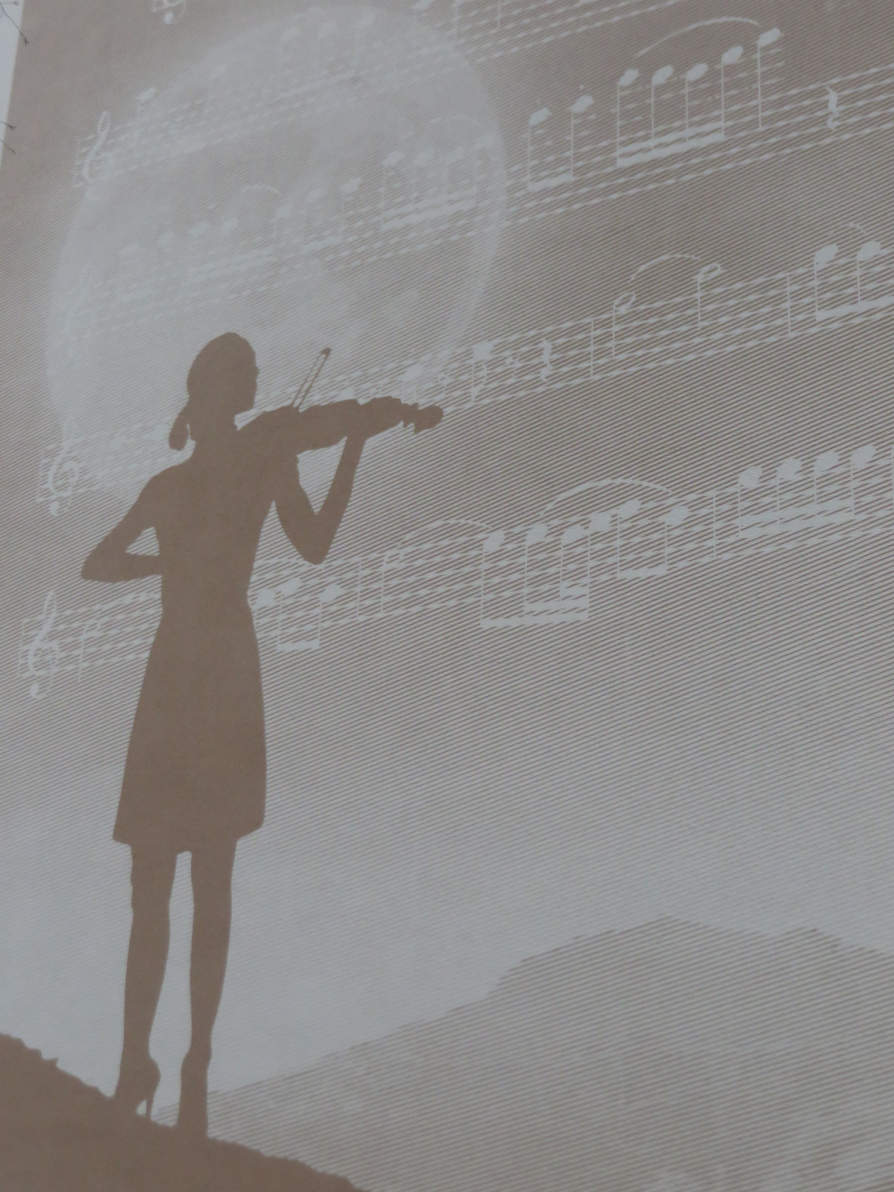 Außenwandmalerei Eine kleine Nachtmusik in der Mozartstraße (Flensburg-Musikerviertel 2020-01-02), Bild 05